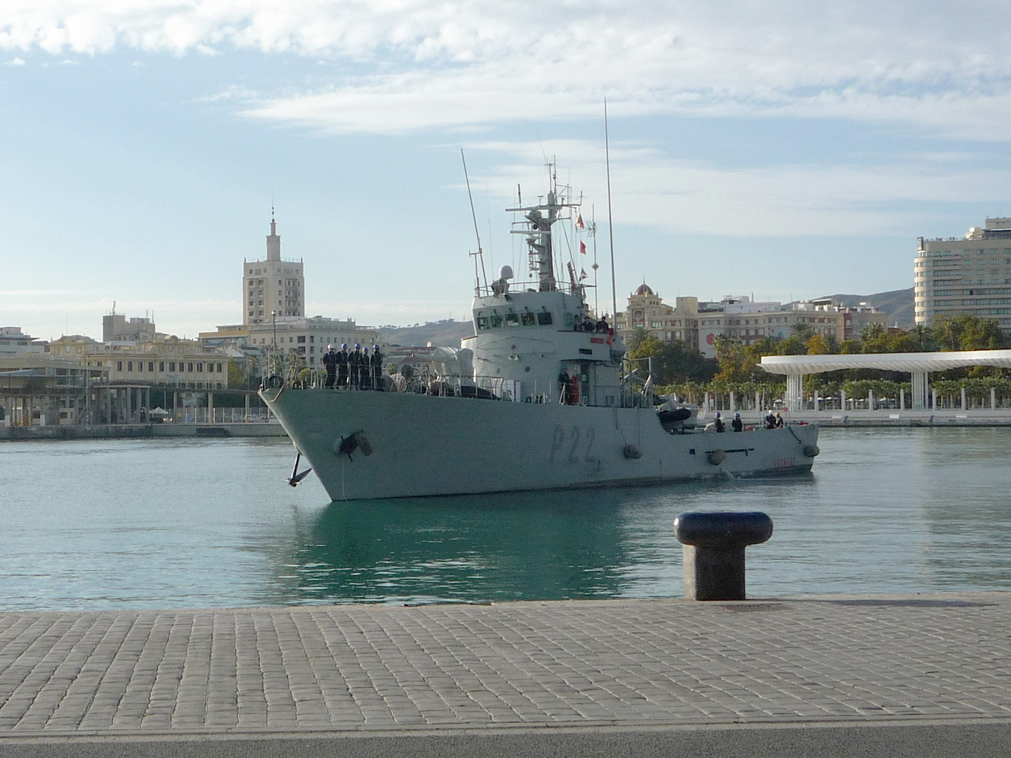 Patrullero Tagomago (P-22). Armada Española.